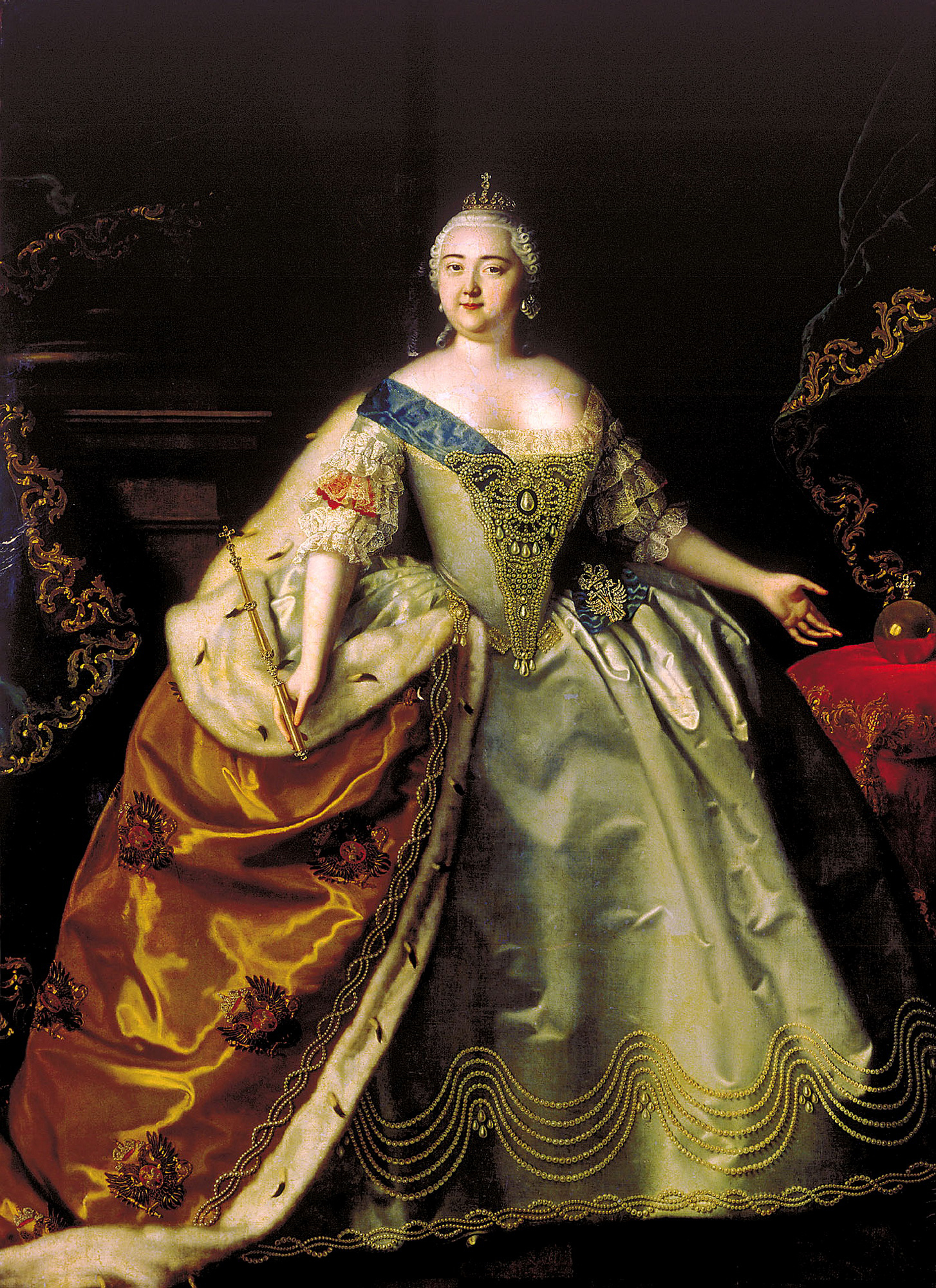 Изображена в горностаевой мантии, с короной на голове, скипетром в правой руке и орденом святого Андрея Первозванного (лента, звезда и крест).